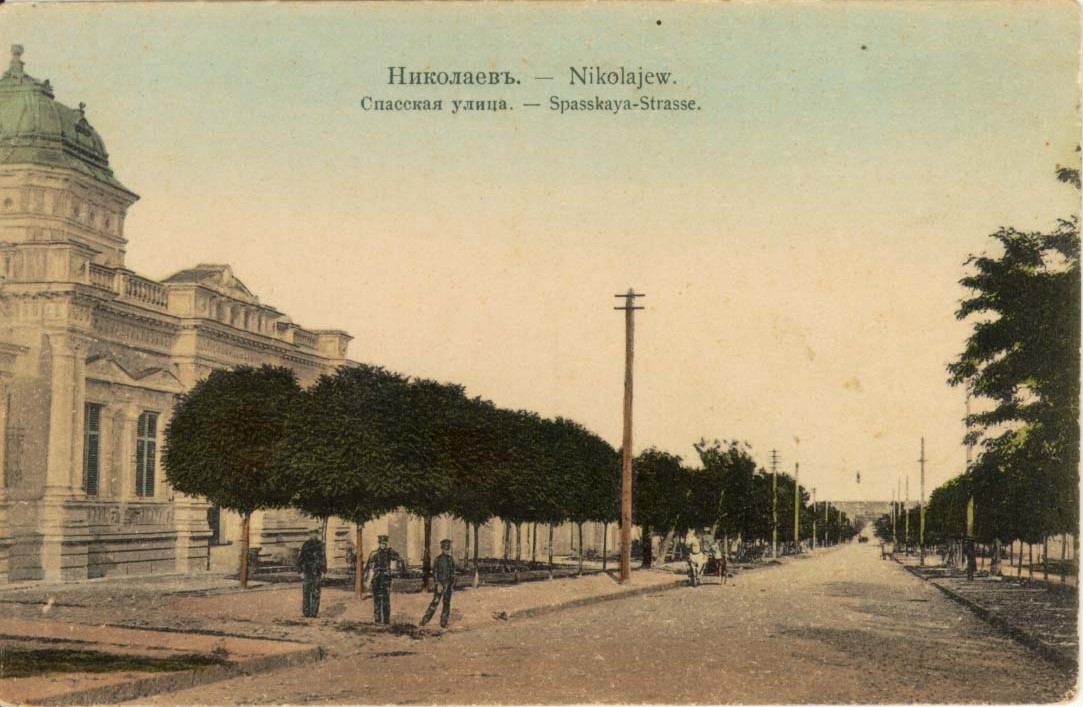 „Nikolajew. Spasskaya-Strasse.“